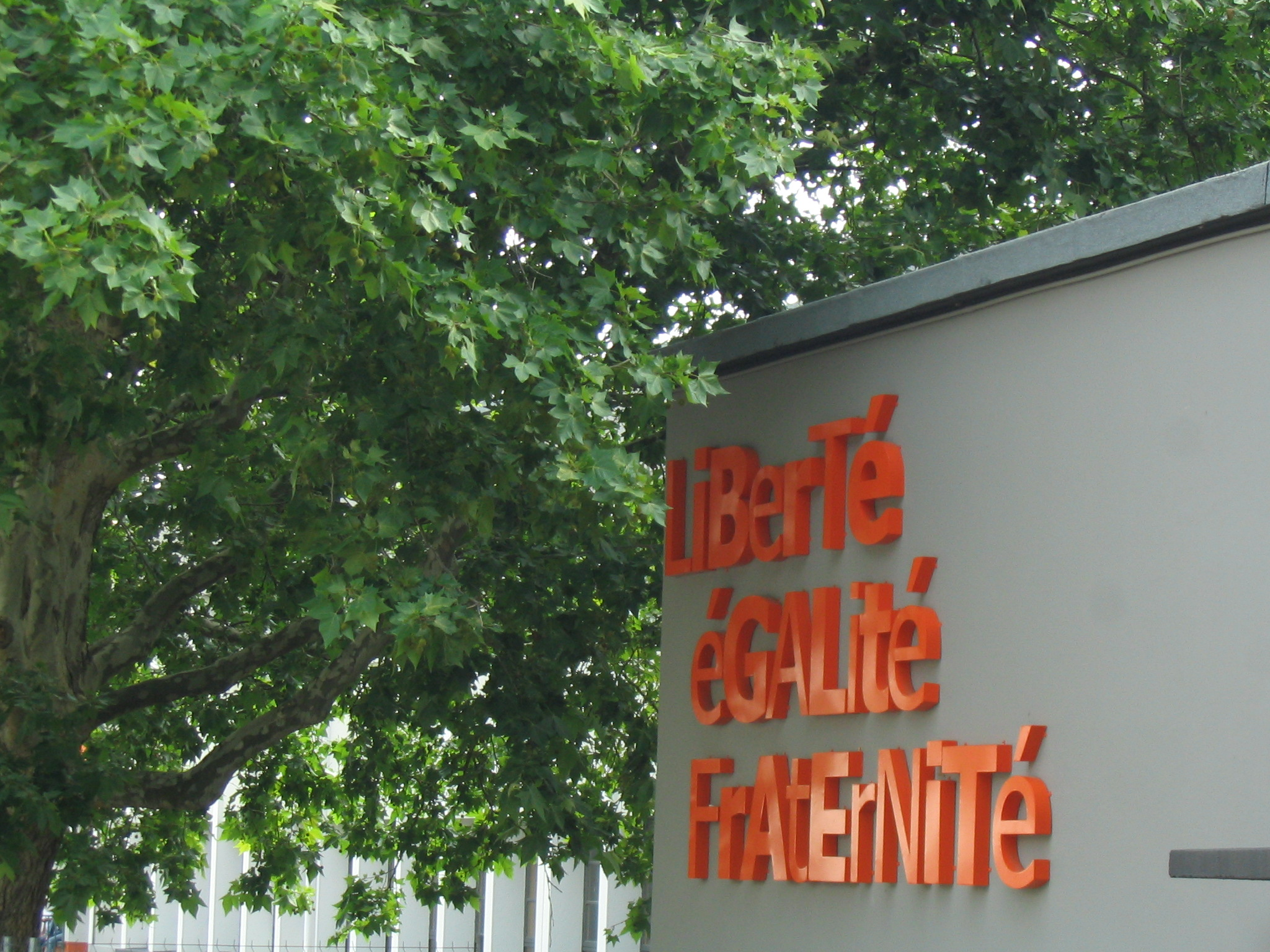 "Liberté, Egalité, Fraternité" sur le mur d'une école publique de Villeurbanne, France